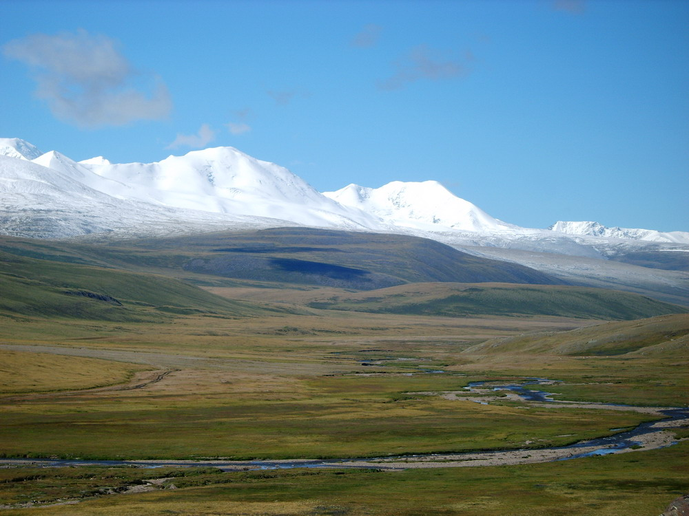 Плосокогорье Укок